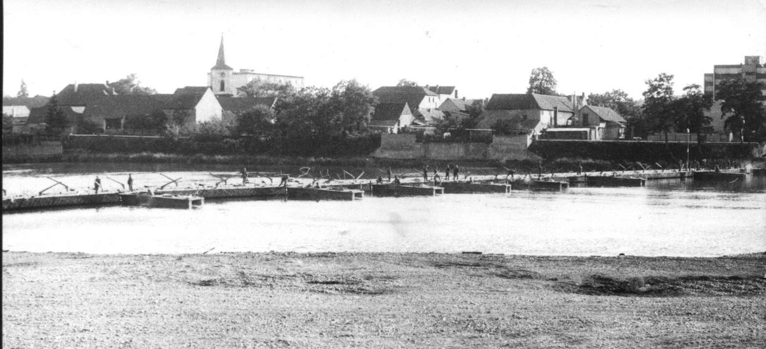 ПМП мост